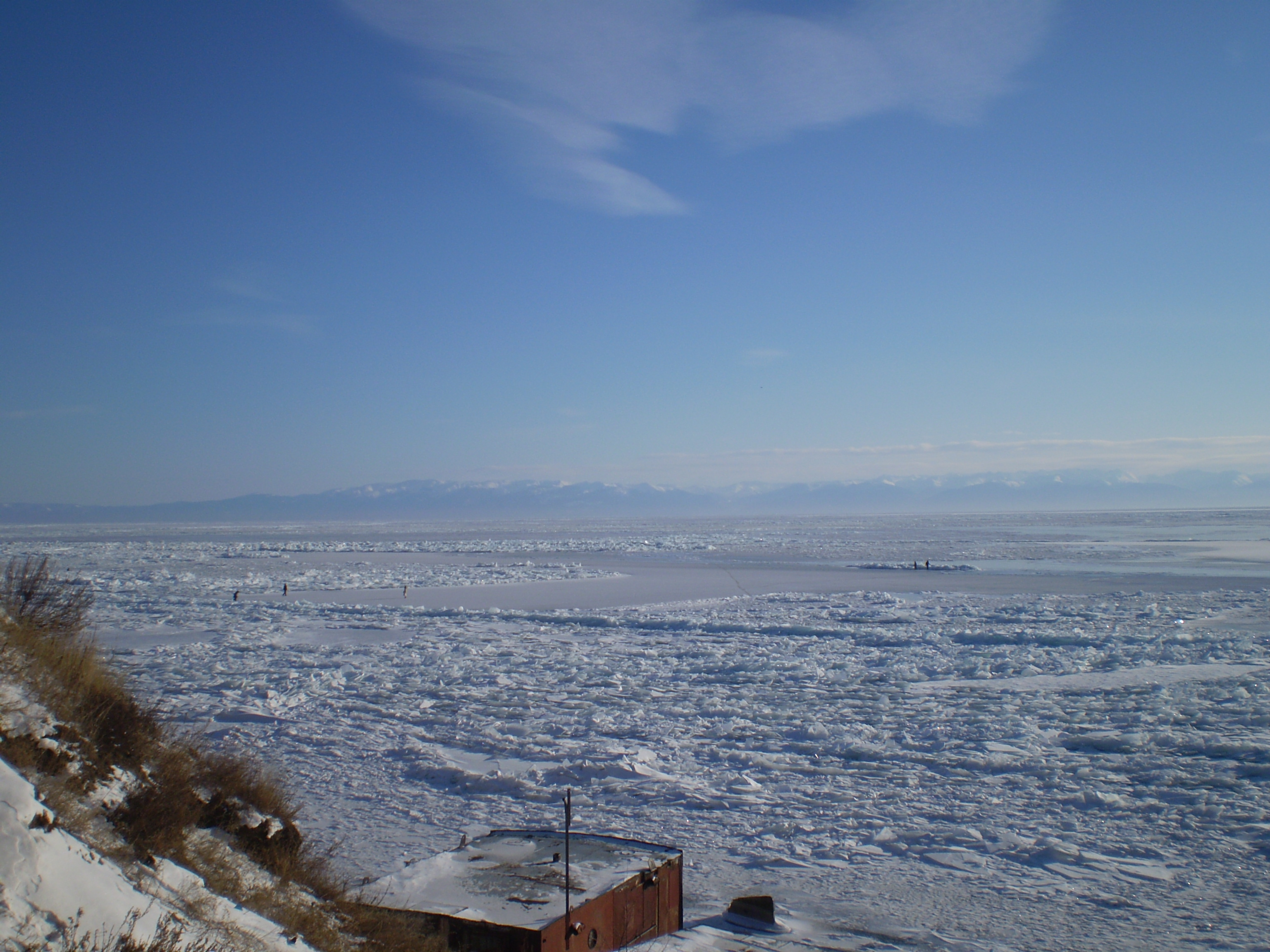 Overlooking Lake Baikal from Listvyanka